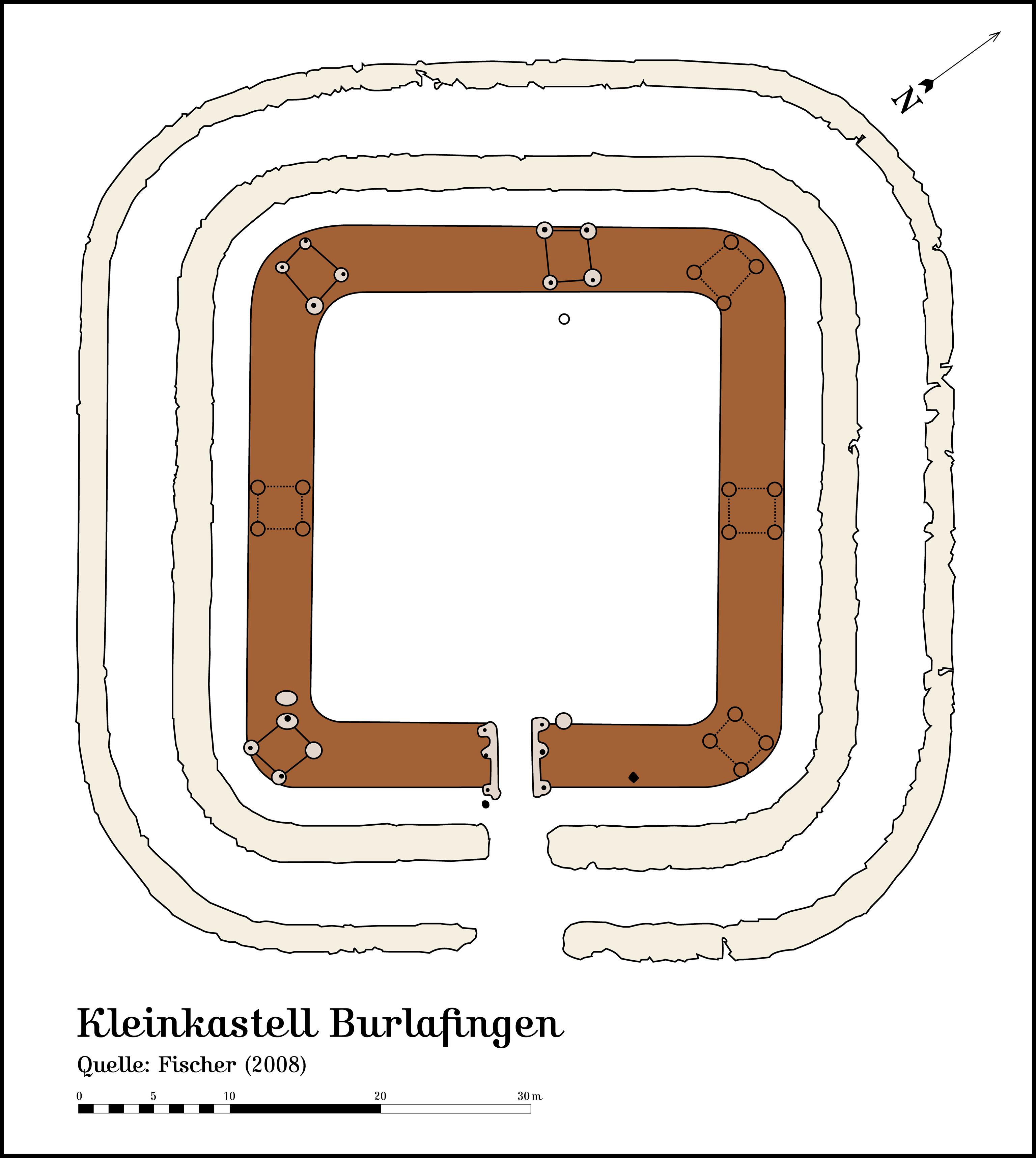 Übersicht zur Grabung am Kleinkastell Bulafingen, Neu-Ulm/Donau, nach Mackensen in Fischer (2008)